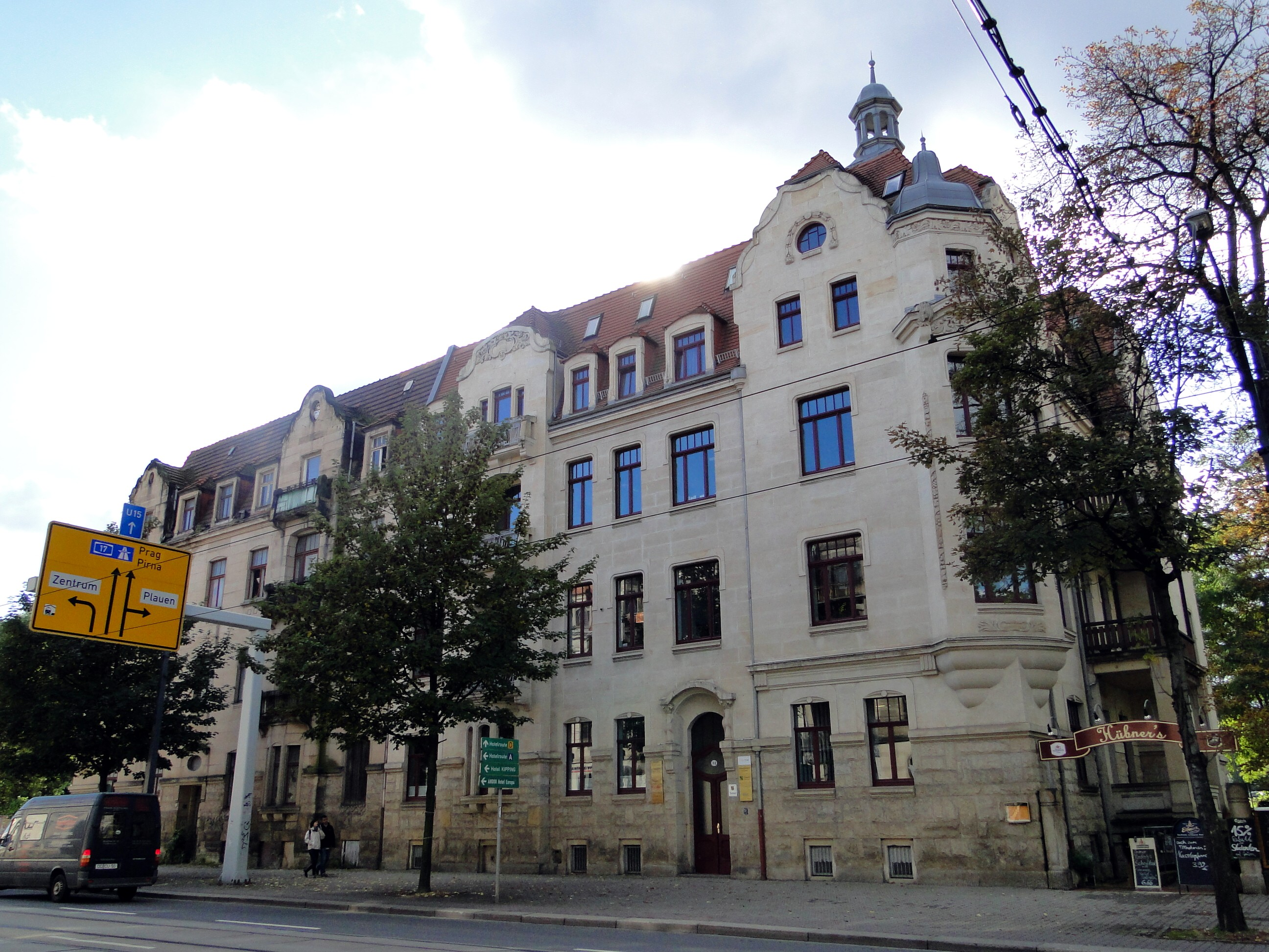 Mietshaus Nürnberger Straße 32 und 34 in Dresden mit Elementen des Jugendstils